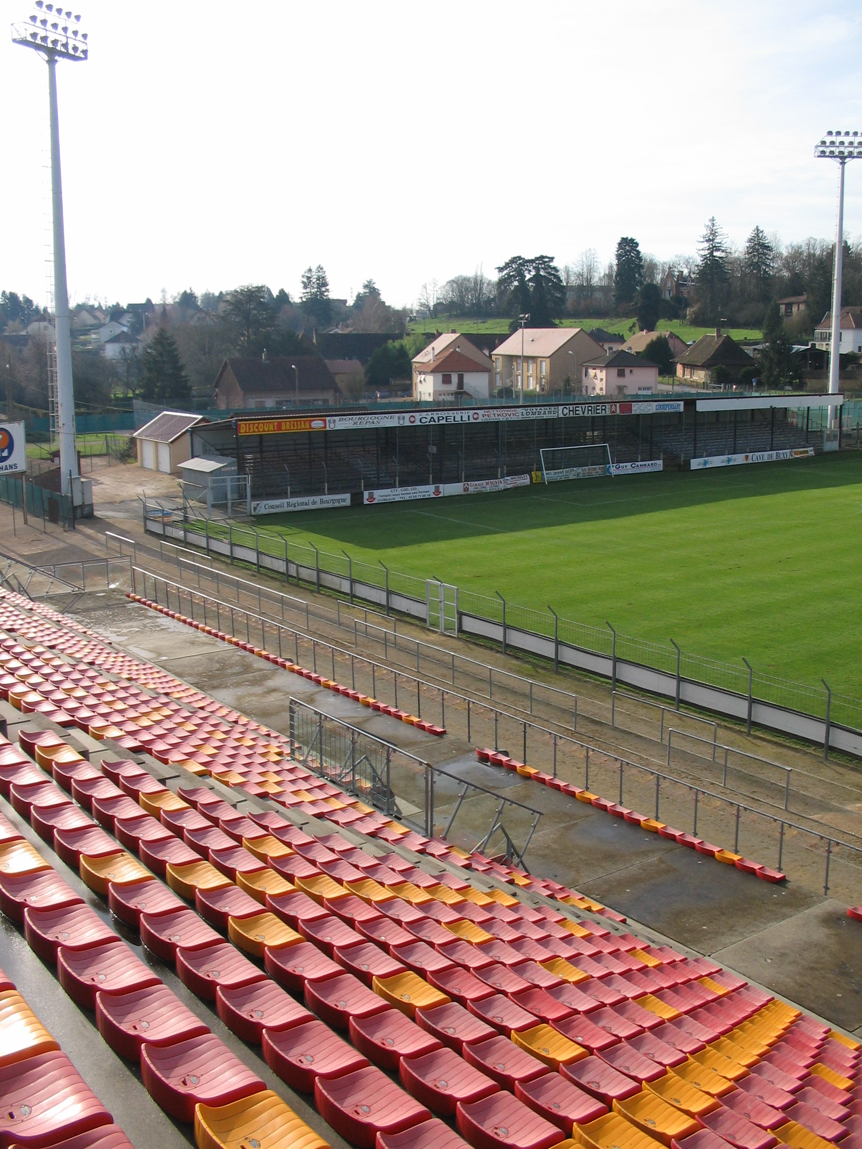 Parc des sports de Bram, Louhans (71) - grande tribune est, gradins sud en fond.